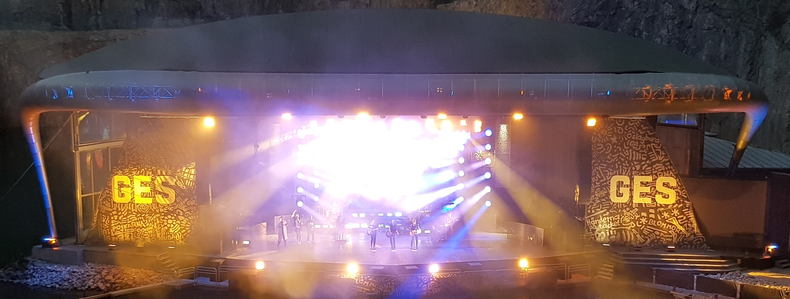 GES uppträder på Dalhalla i Dalarna den 12 juli 2018. Låten de framför är "När vi gräver guld i USA".